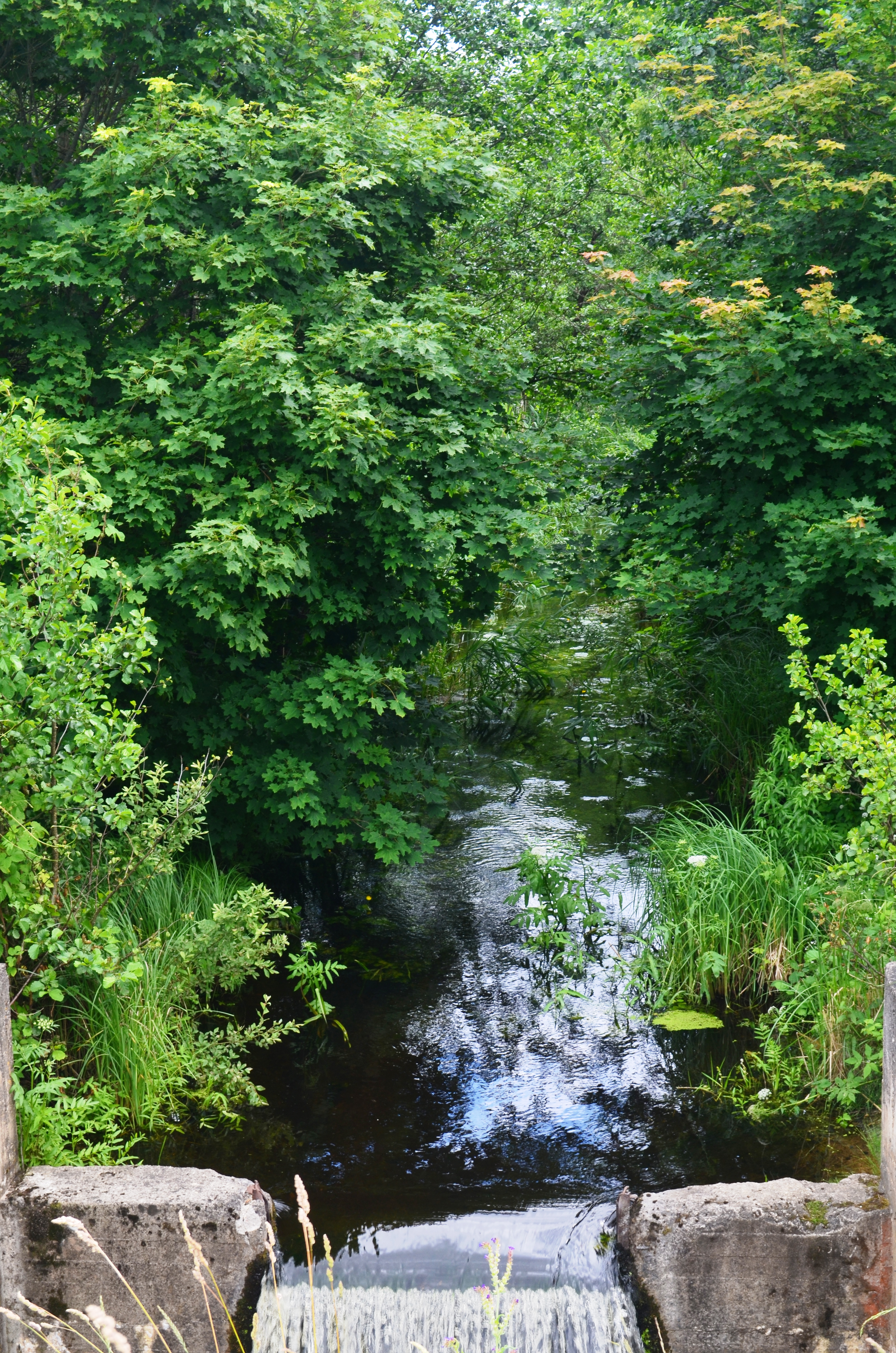 Peršėkė šalimais Cigoniškių, Alytaus raj.